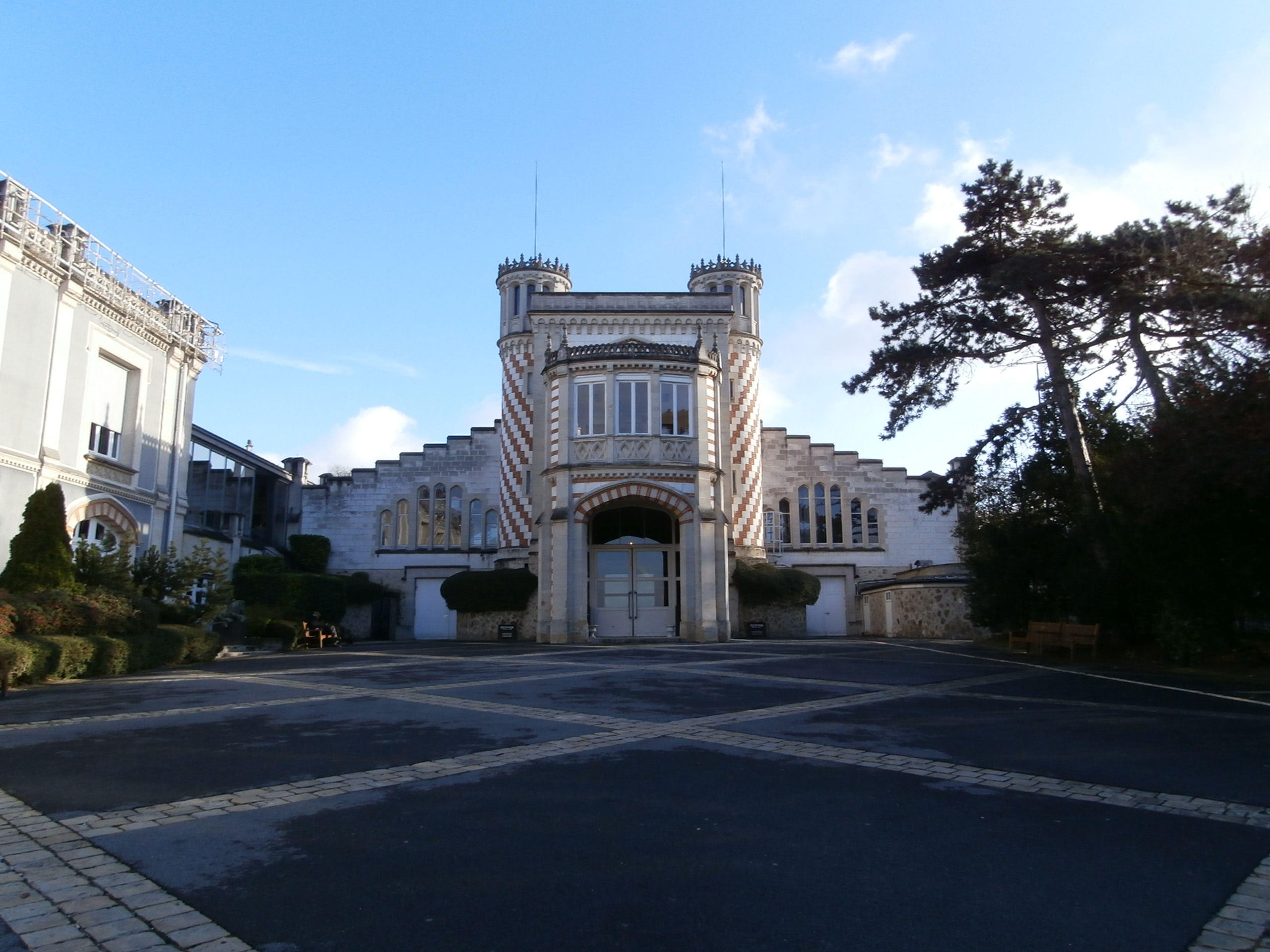 Domaine Pommery : Château de style élizabéthain Reims, 5 place du Général Gouraud Années de construction : de 1868 à 1878 Initiatrice du projet : Jeanne-Alexandrine Louise Pommery